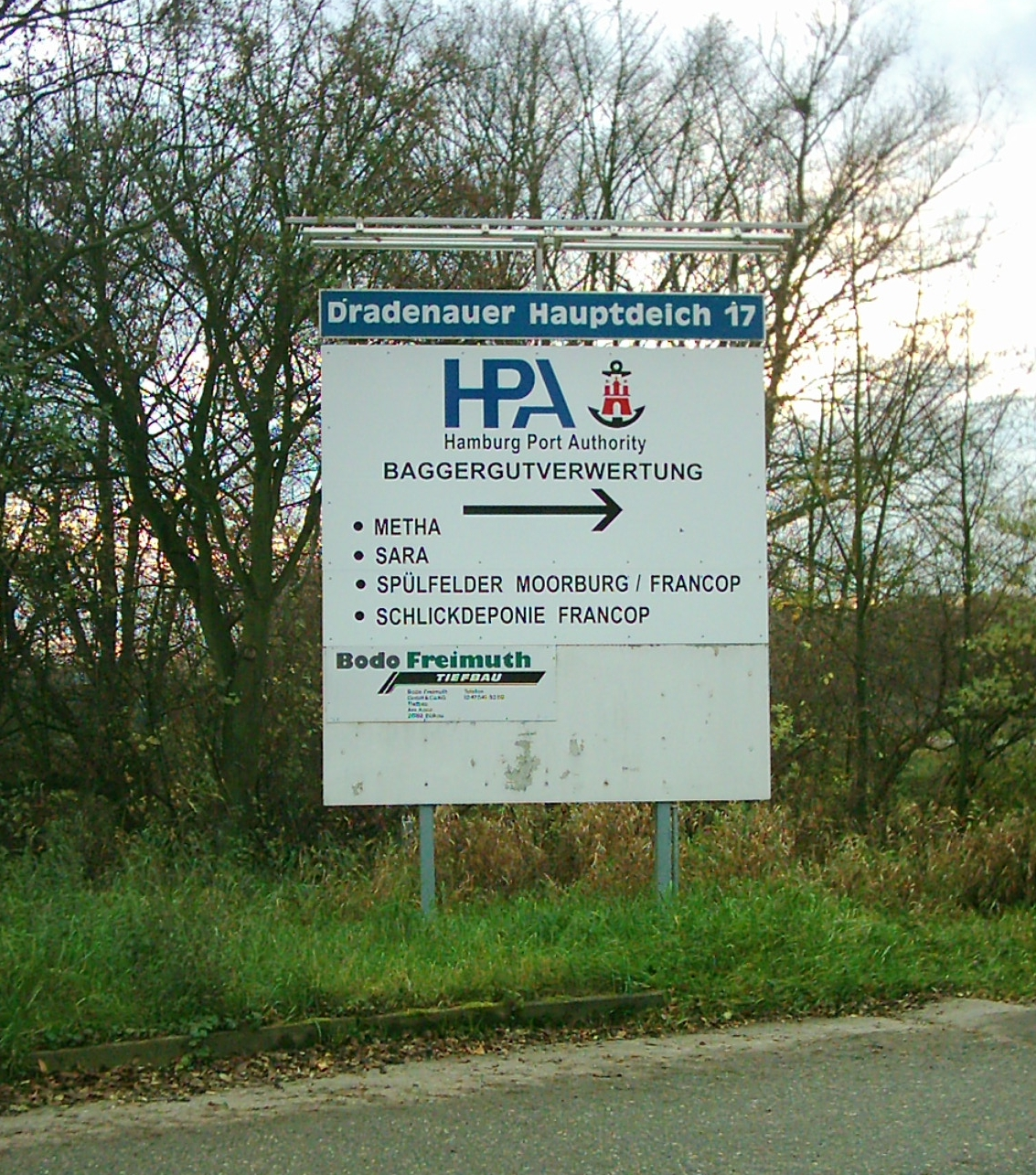 Zufahrt Hamburg Port Authority Baggergutverwertung am Dradenauer Hauptdeich, Hamburg-Altenwerder.